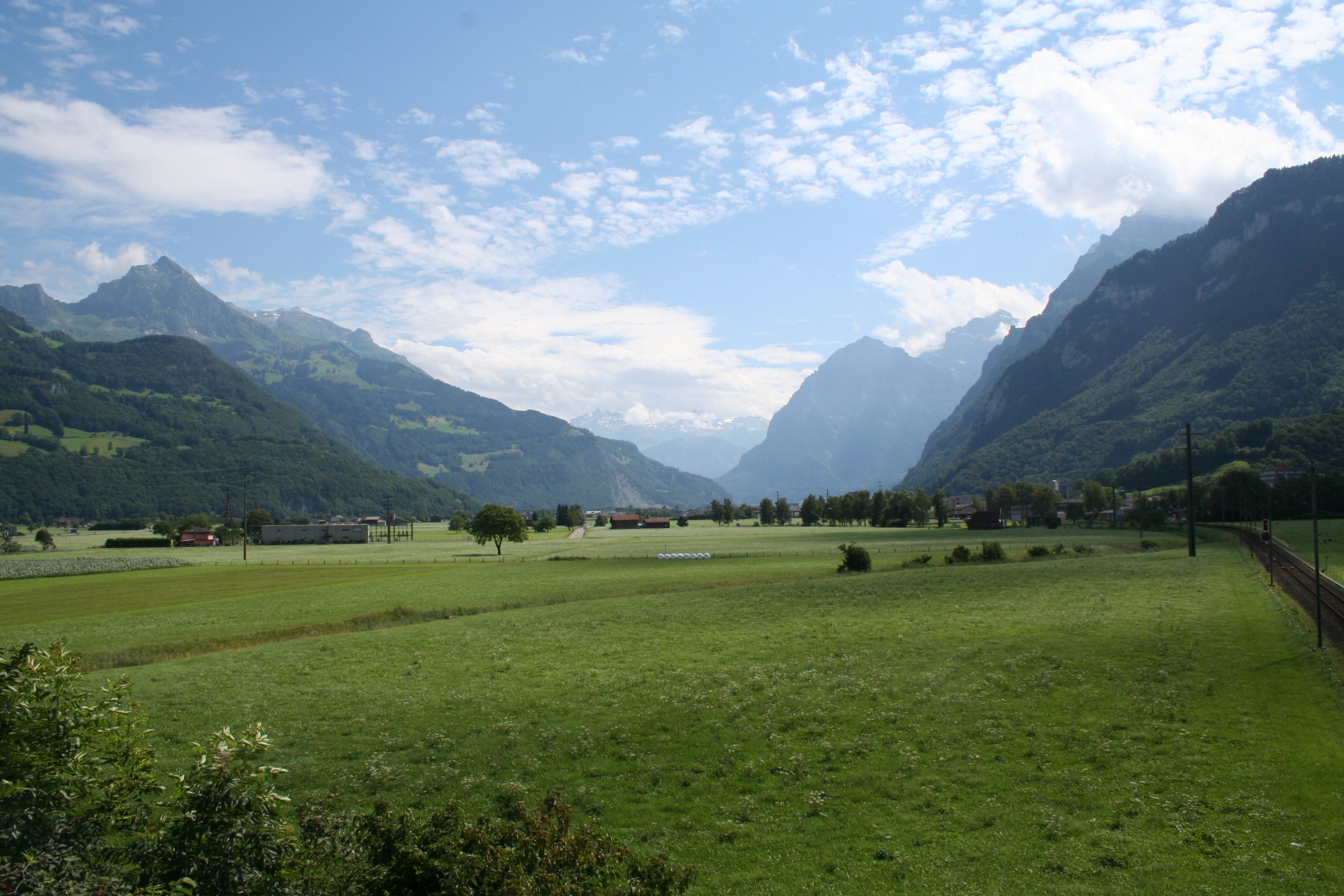 Das Linthtal Richtung Süden